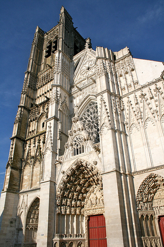 Cathédrale Saint-Etienne, Auxerre